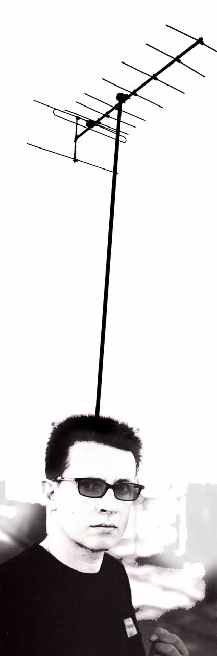 Bild von Wolfram der Spyra